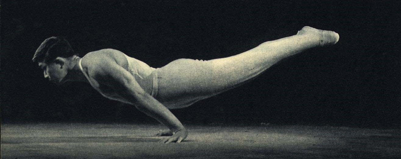 1962-04 1962年 体操运动员 叶贻达 水平支撑